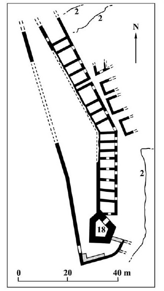 карта на Садовско кале по Иван Велков, 1935г.